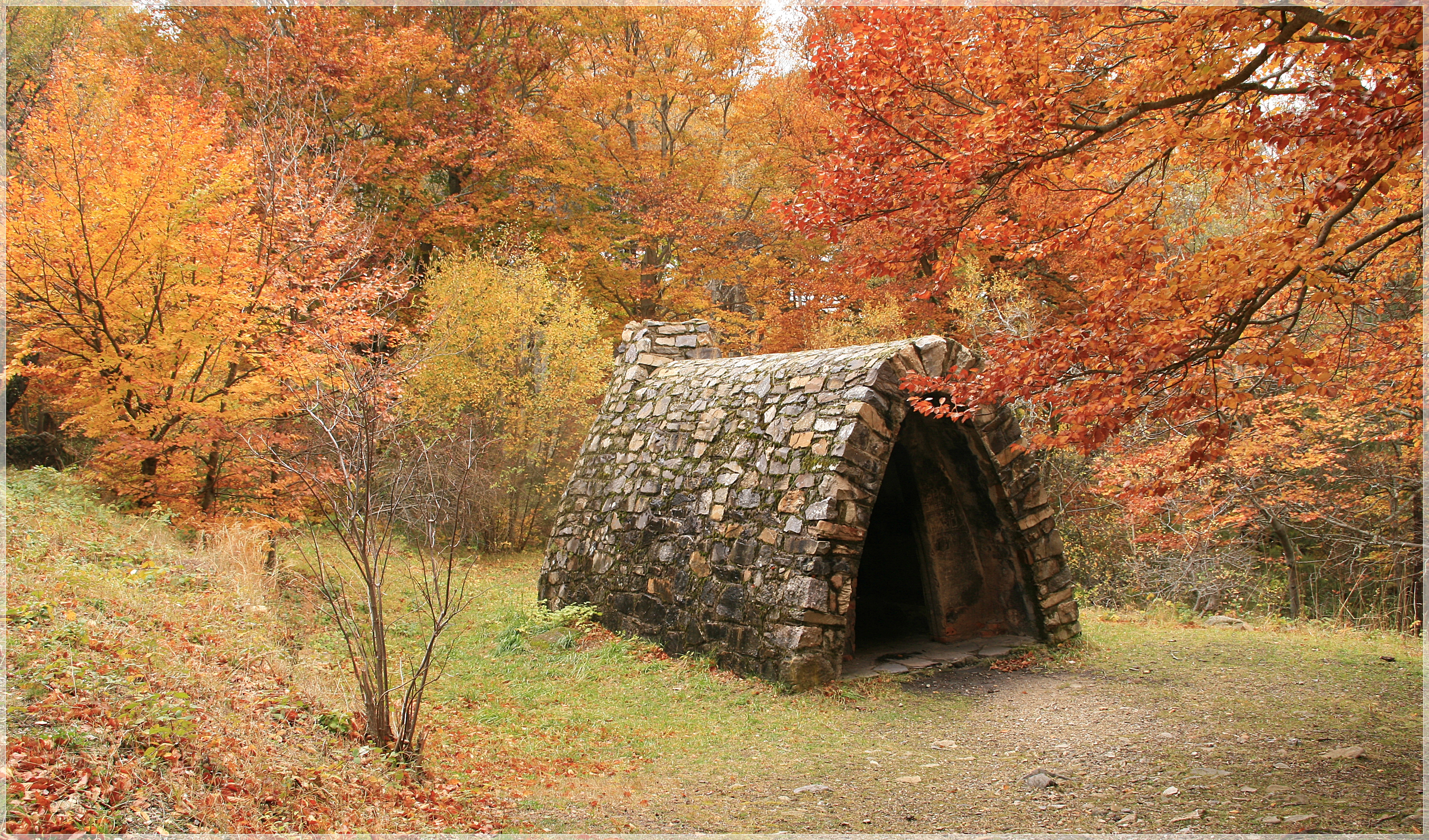 Otoño en el Moncayo-Zaragoza.Aragón